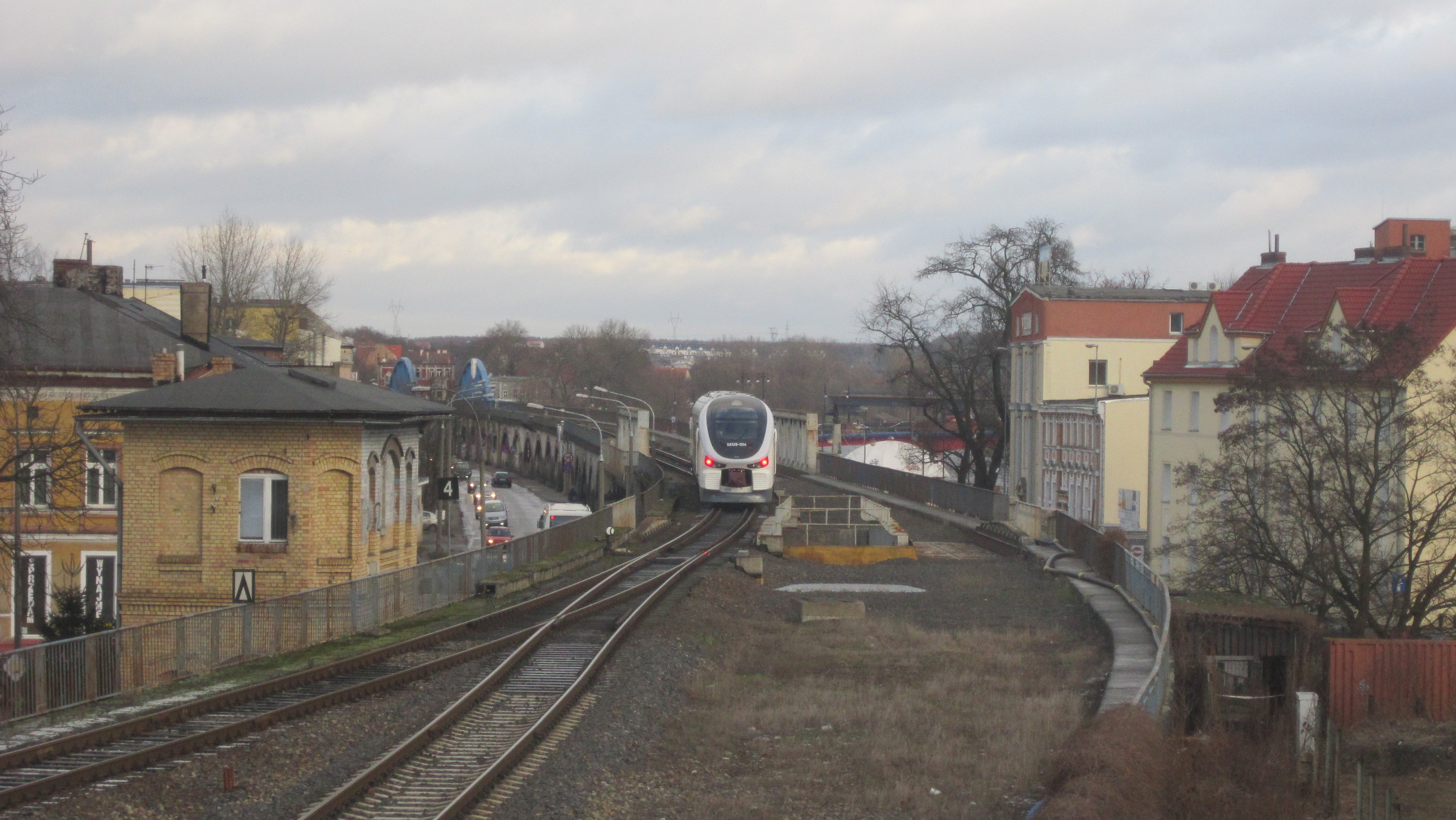 Widok z nastawni Go1 na Link na estakadzie w Gorzowie